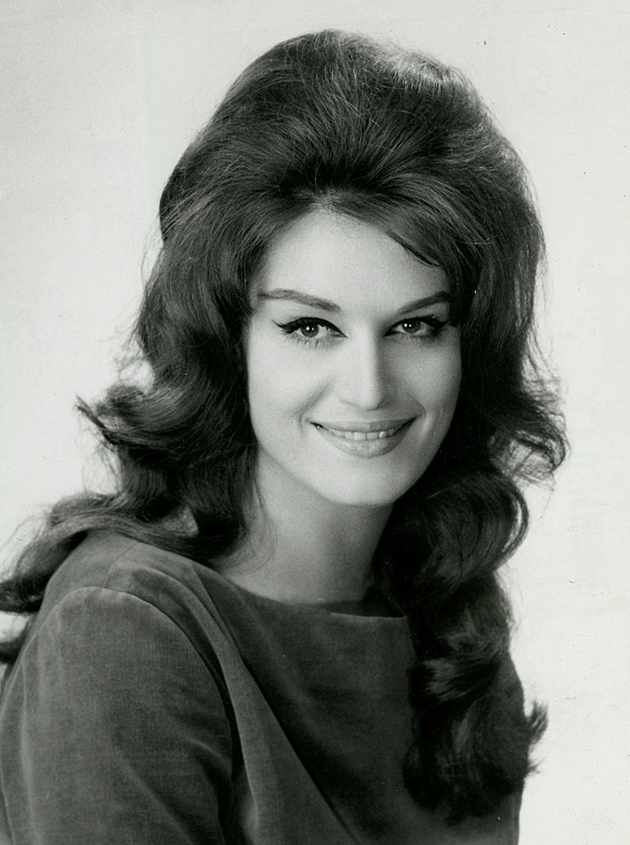 Dalida